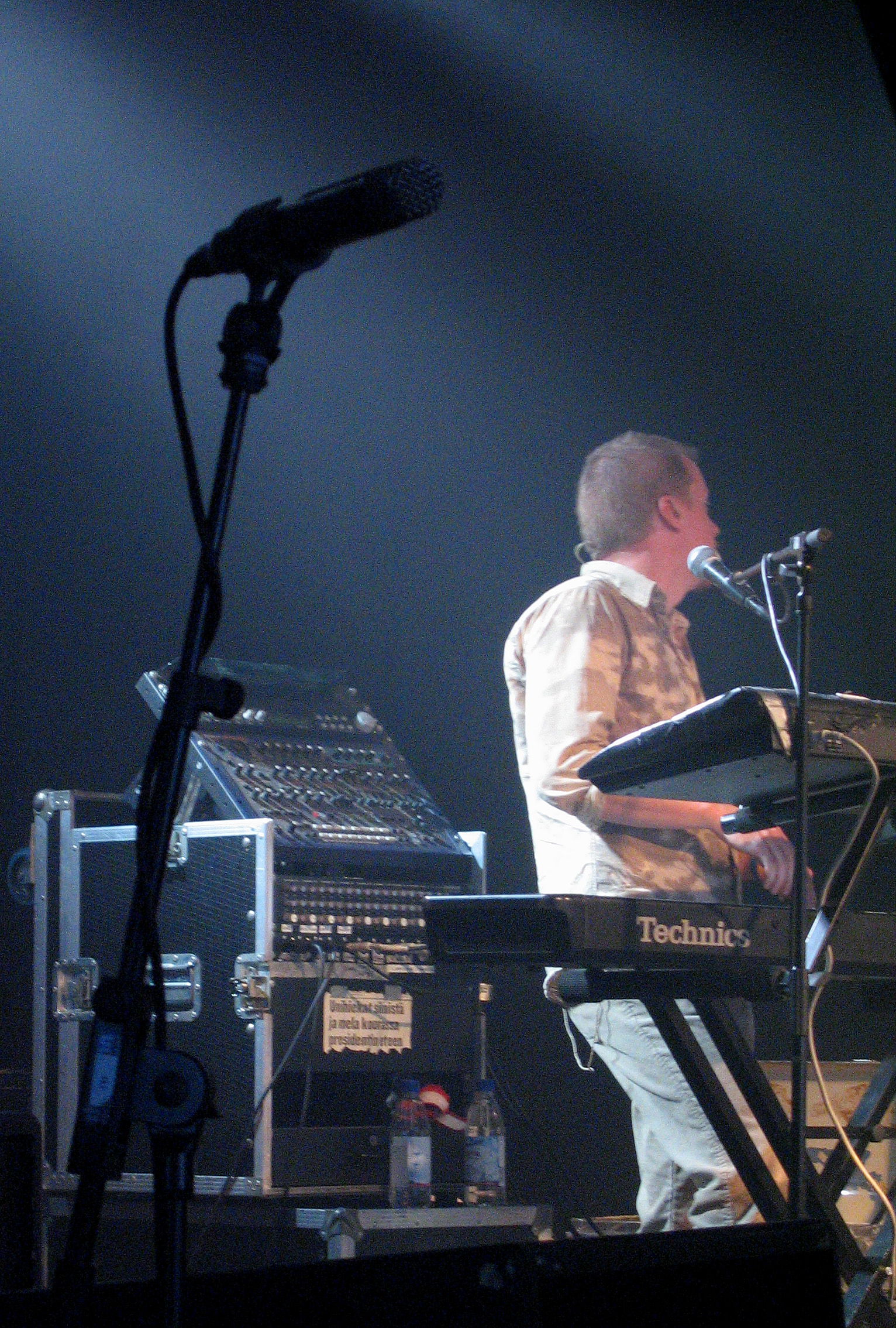 Lappu kaapissa: "Unihiekat silmistä ja mela kourassa presidentin eteen"